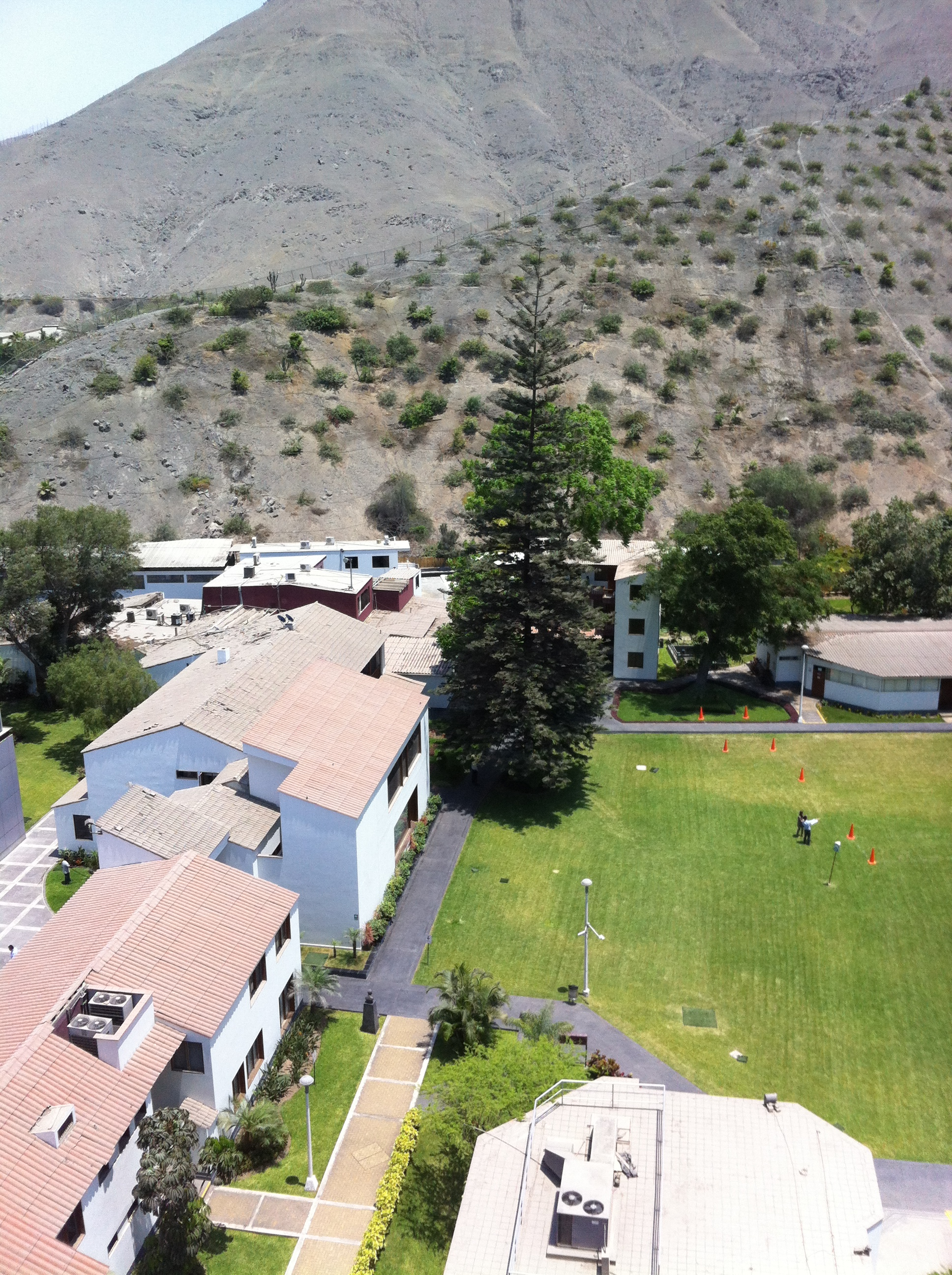 Se observa un pino que representa tanto a Esan como a la Universidad de Standford que es la que fundó esta casa de estudios en el Perú en el año 1963.